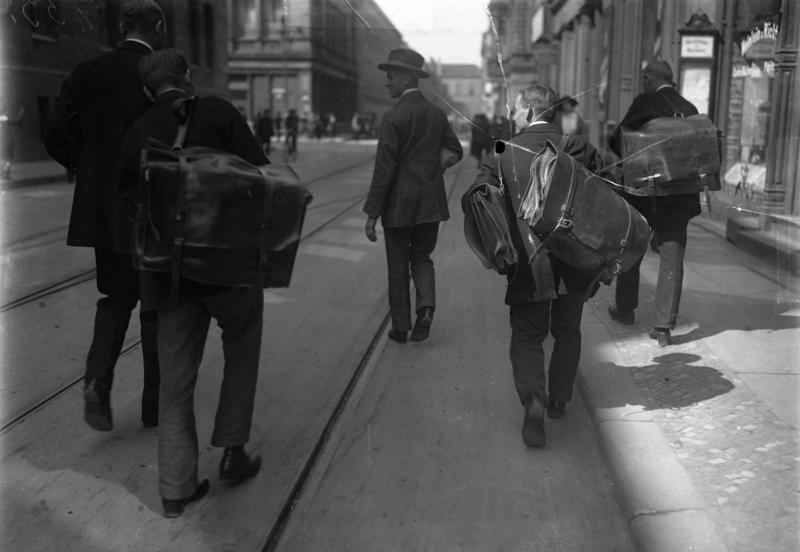 Die katastrophale Geldentwertung in Deutschland. Mit grossen Ledertaschen holen Angestellte einer Grossbank unter Bewachung von Kriminalbeamten hohe Werte von der Reichsbank.